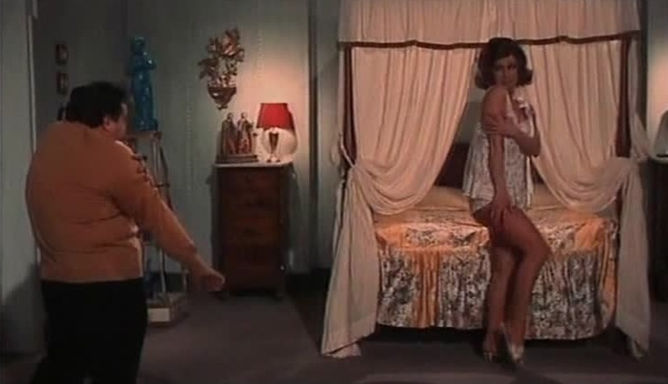 Screenshot del film Mondo pazzo... gente matta!, 1966, regia di Renato Polselli